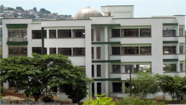 Nuevo bloque de la Universidad de la Amazonia en Florencia (Caquetá)